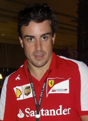 Fernando Alonso di Malaysia 2013